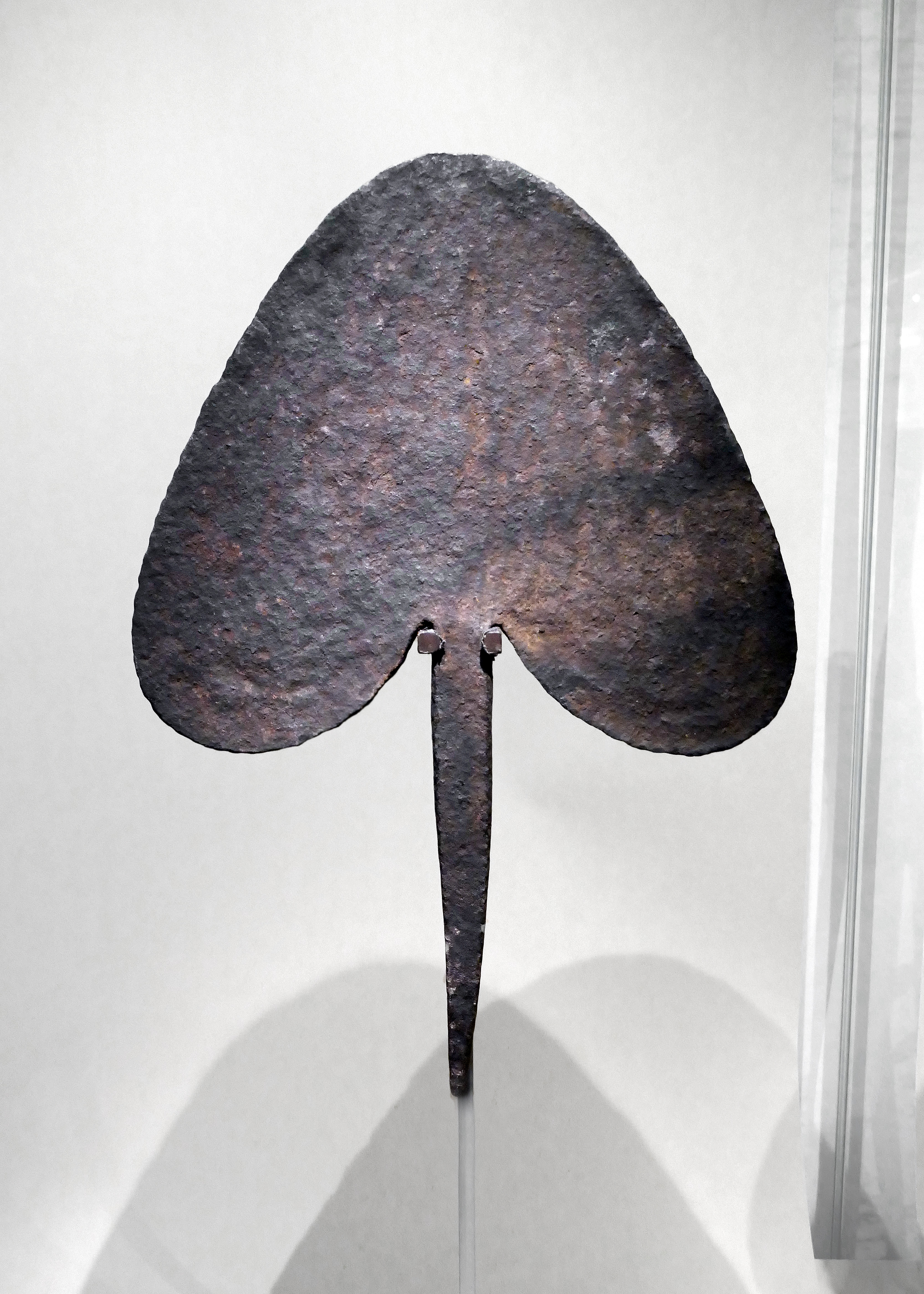 Monnaie en forme de lame de houe Population Iramba (Tanzanie) Artiste inconnu 19e siècle Fer Collection privée